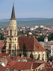 Kolozsvári Szent Mihály-templom, Pasztilla jóvoltából és engedélyével